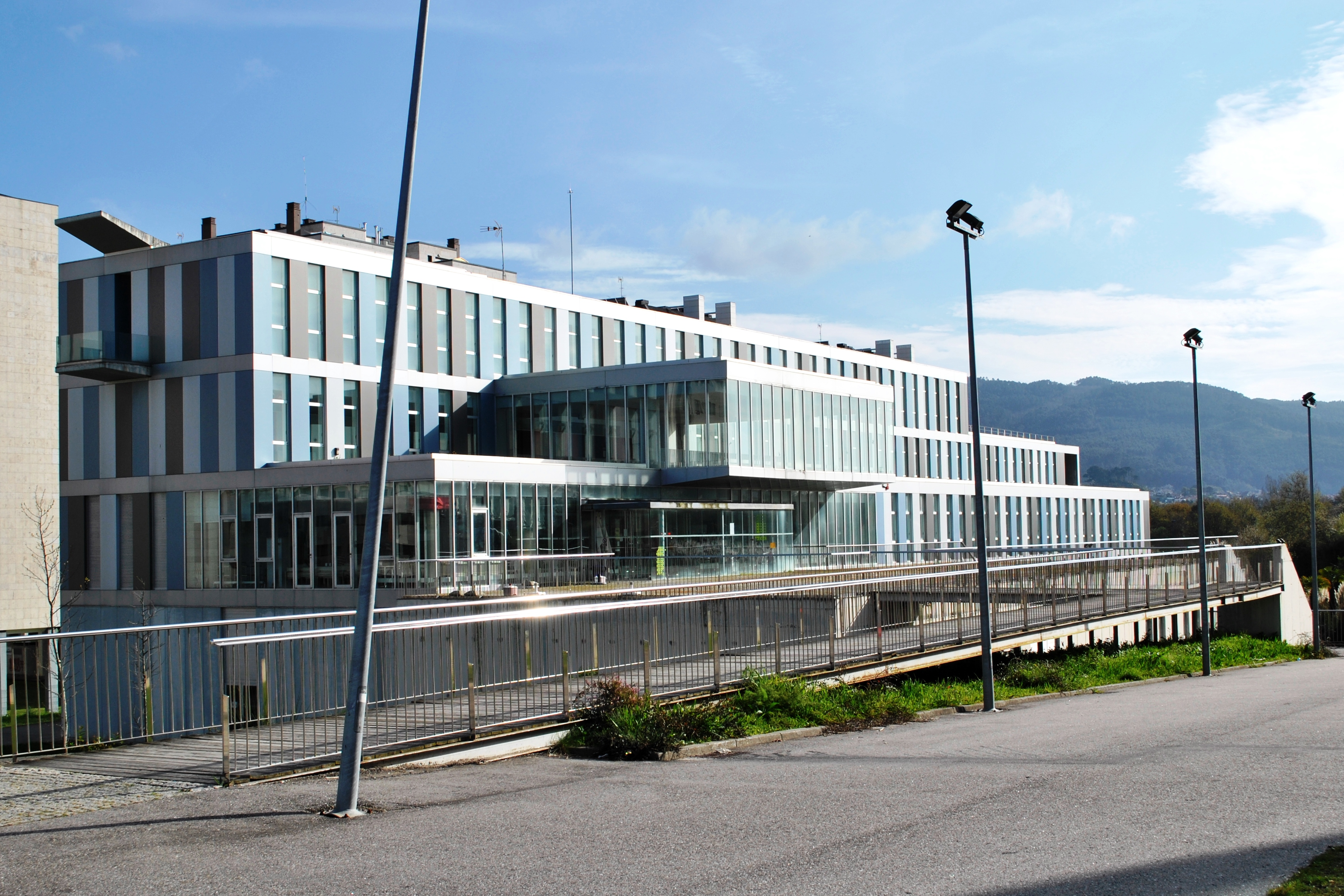 Véxase o título e as categorías.